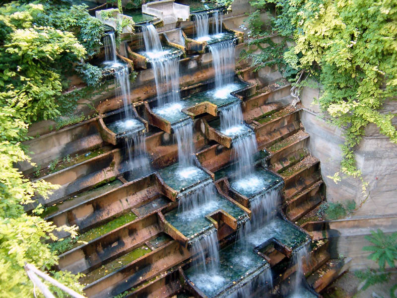 Извор топле воде у Нишкој Бањи